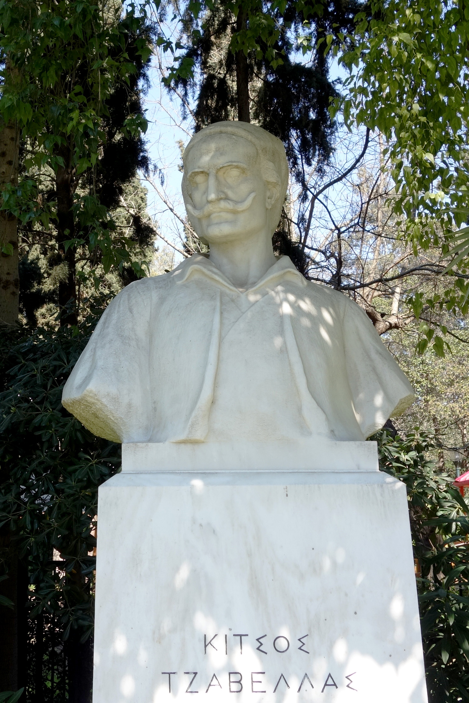 Άγαλμα του Κίτσου Τζαβέλα στο Πεδίον του Άρεως. Έργο του Τηλέμαχου Γύζη (1937)